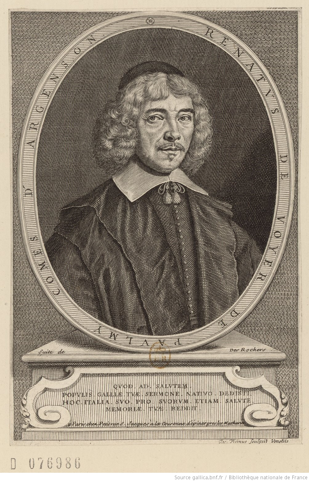 Portrait de René de Voyer-de-Paulmy d'Argenson (1596-1651)